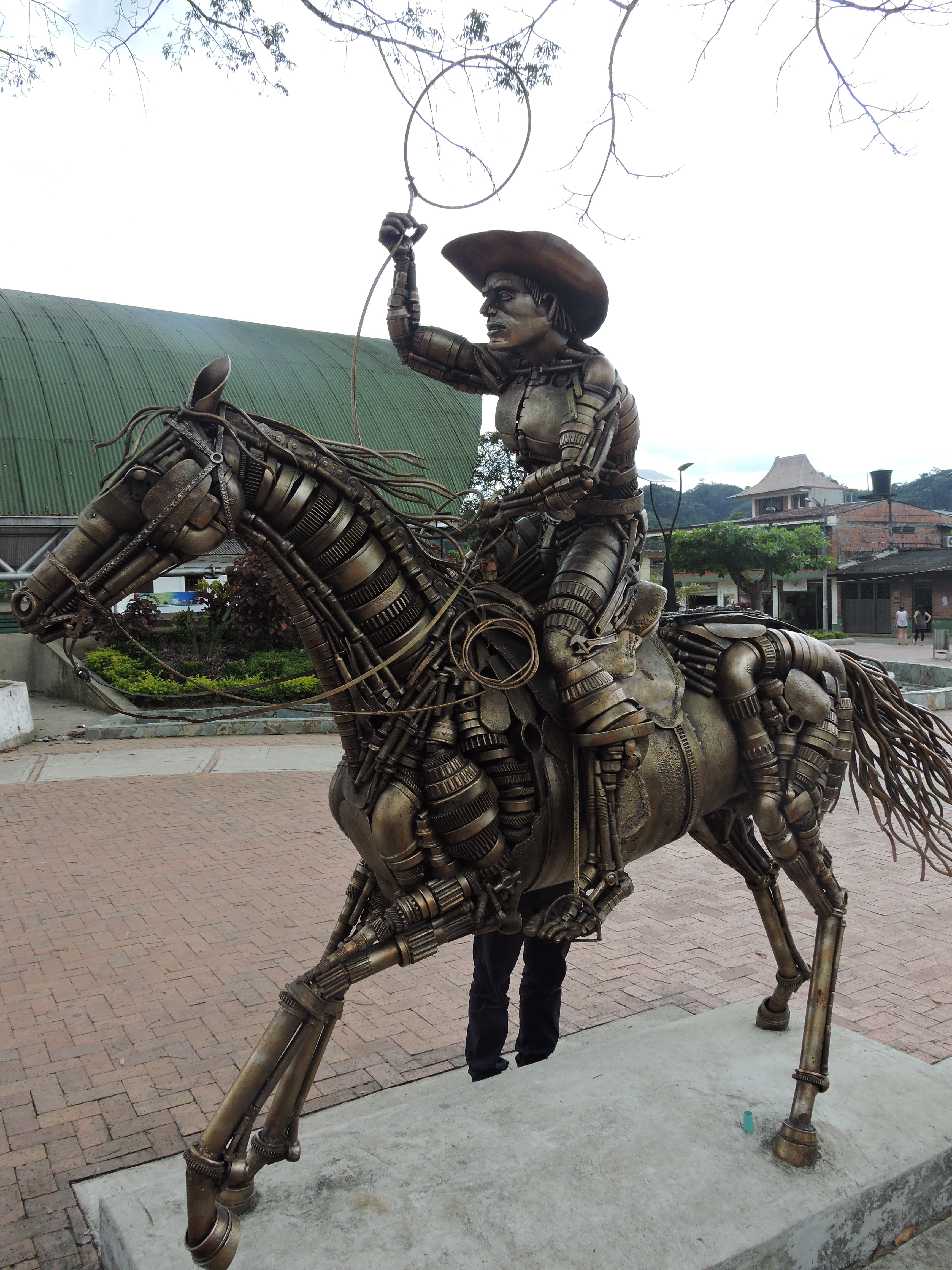 Escultura de jinete en chatarra, Plaza de San Luís de Gaceno - Boyaca, Colombia Esta fotografía fue tomada en el municipio colombiano con código 15667.